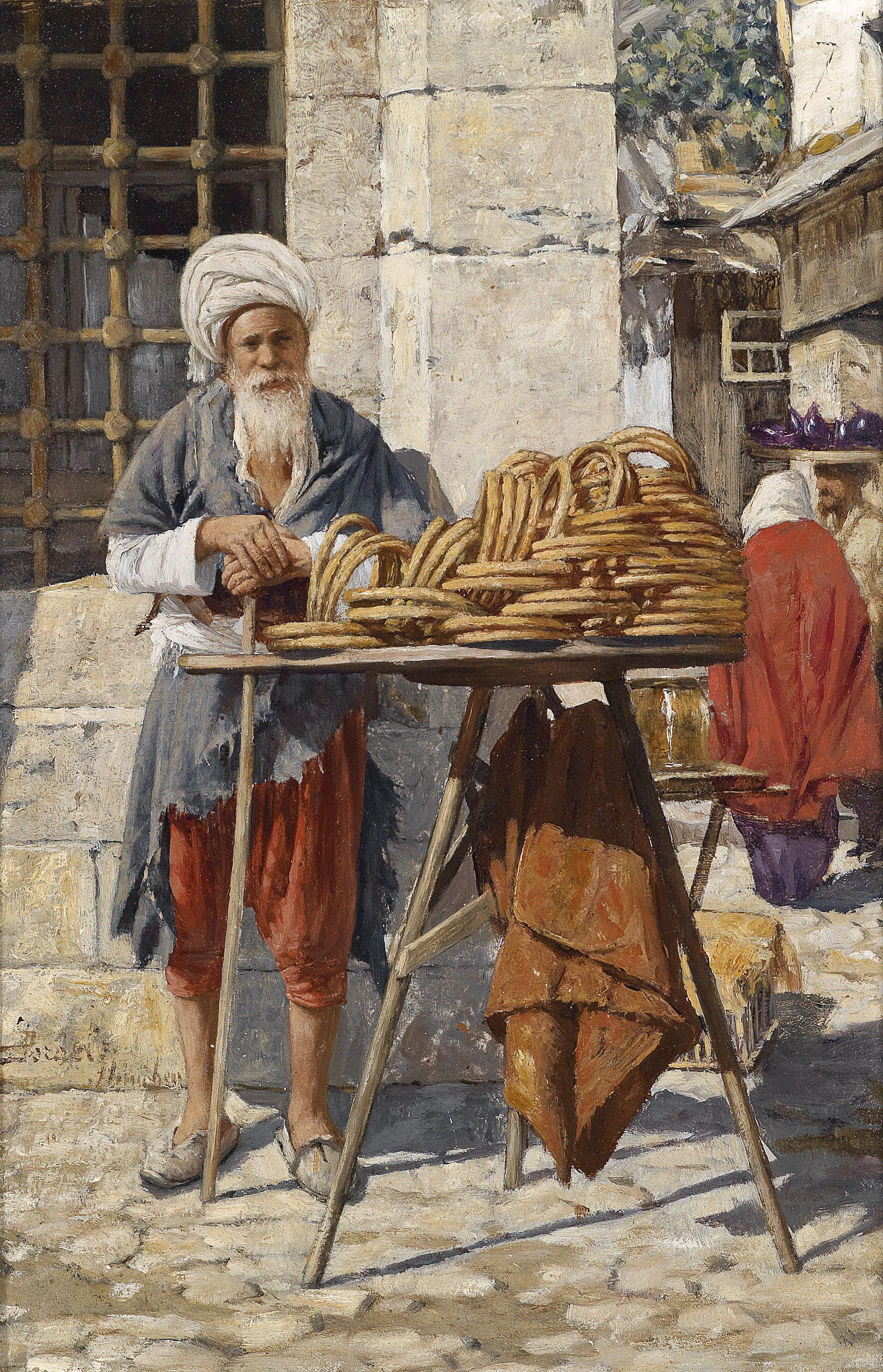 Orientalische Strassenverkäufer